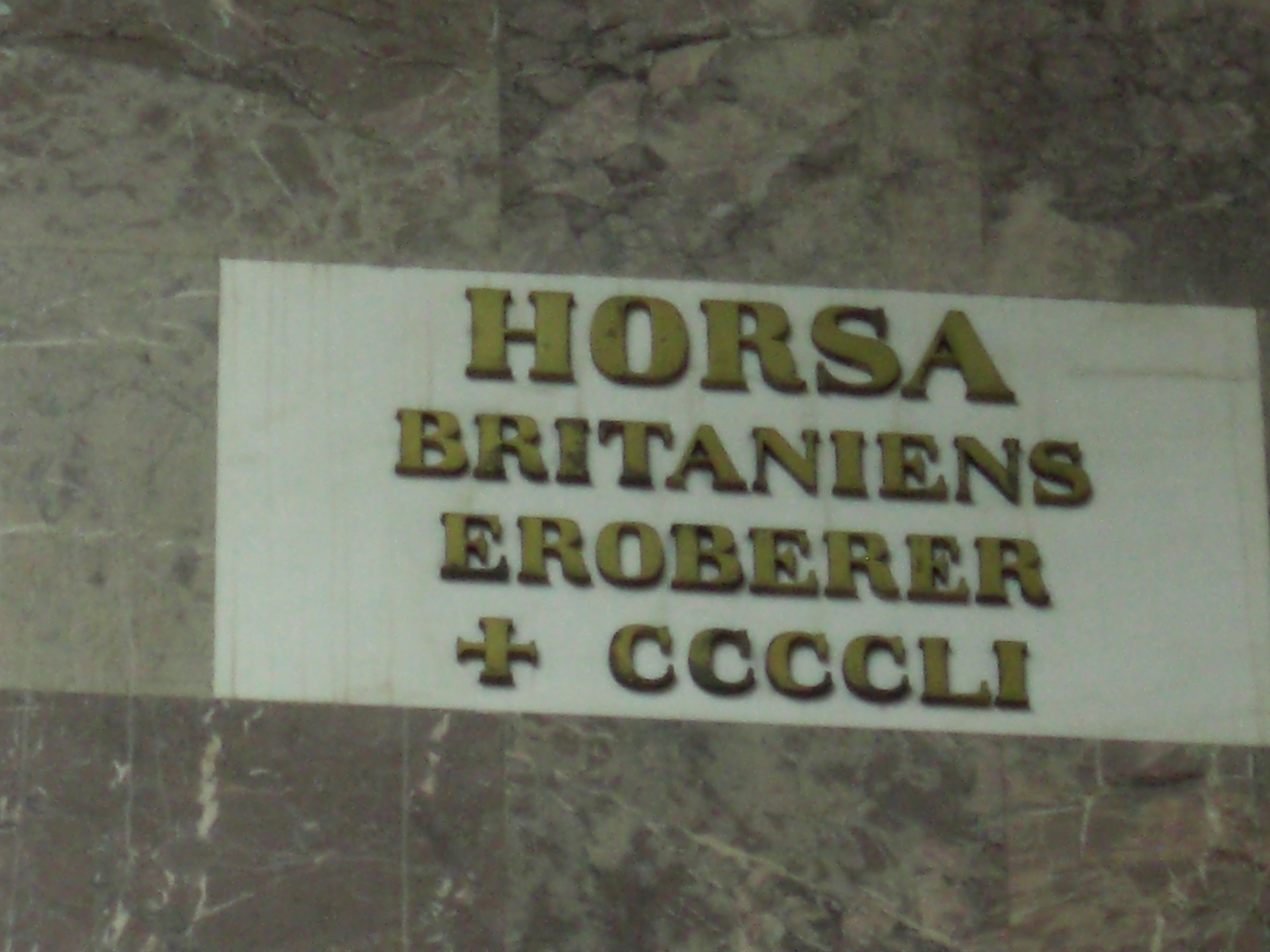 Gedenktafel für Horsa, germanischer Kriegerfürst; Walhalla bei Regensburg